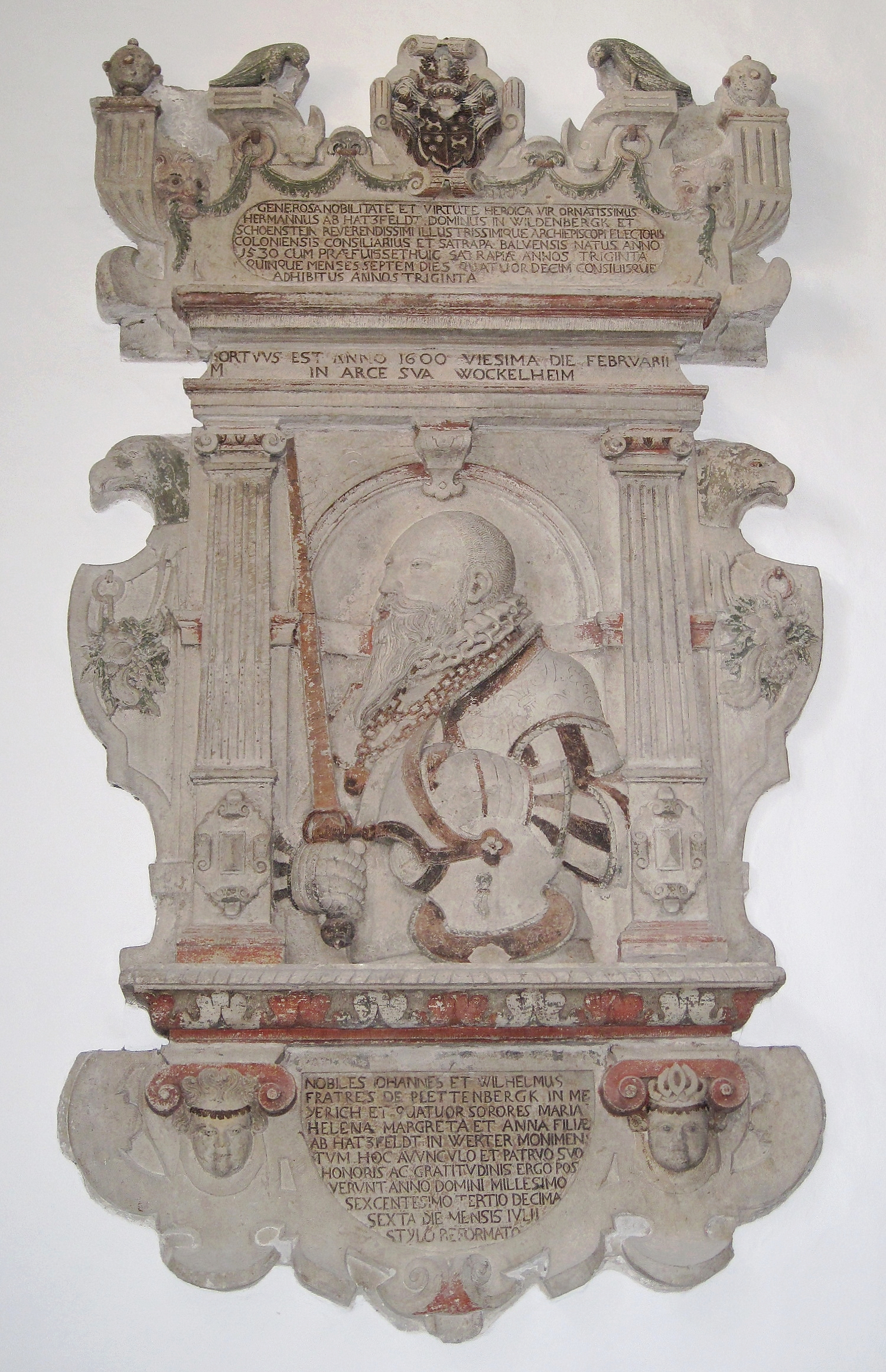 Epitaph des Hermann von Hatzfeldt-Werther-Schönstein im Seitenschiff der Pfarrkirche St. Blasius in Balve.